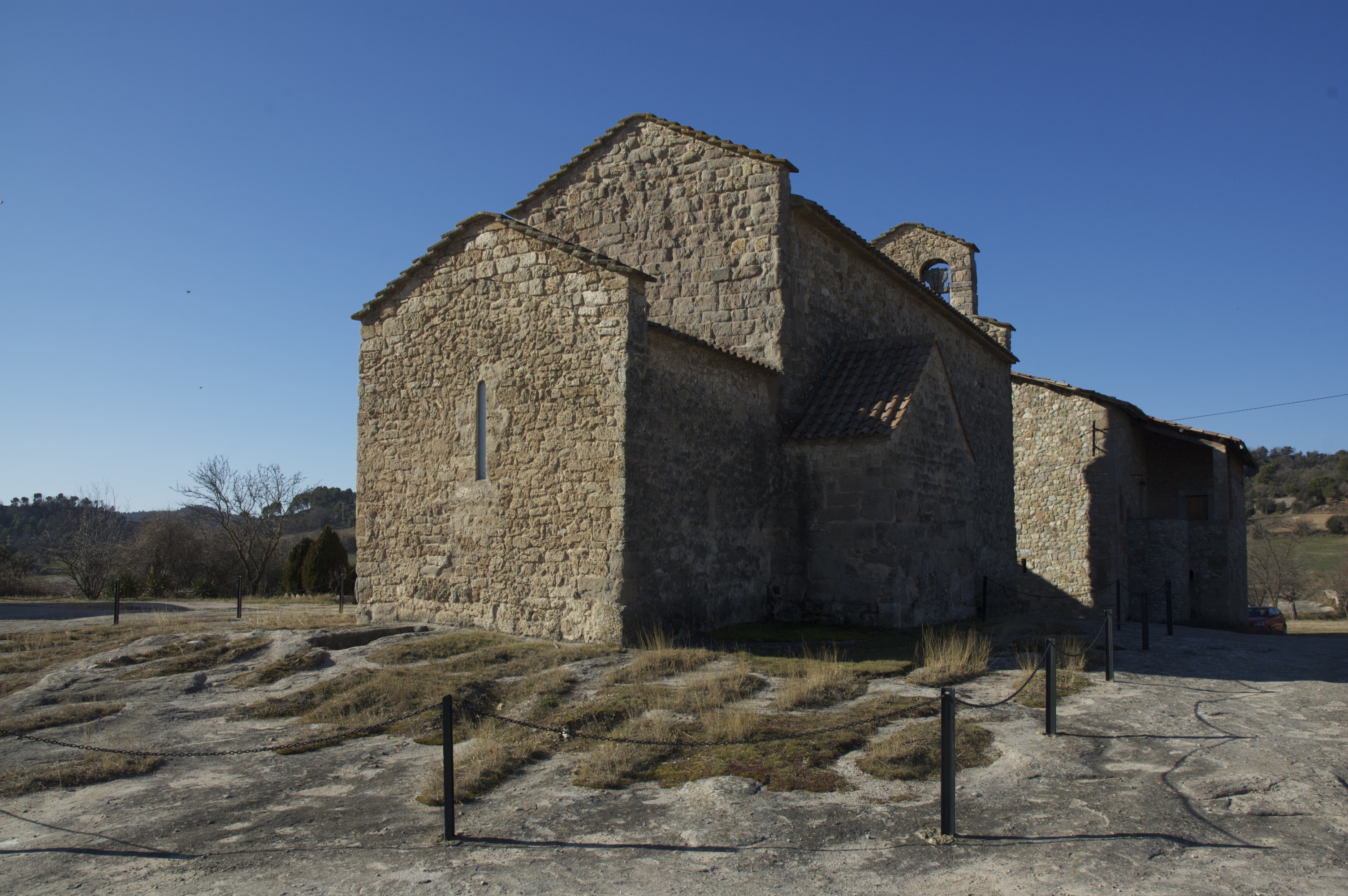 Vista exterior de l'església des del nord-est. S'hi observa part de la seva necròpoli de tombes excavades a la roca.